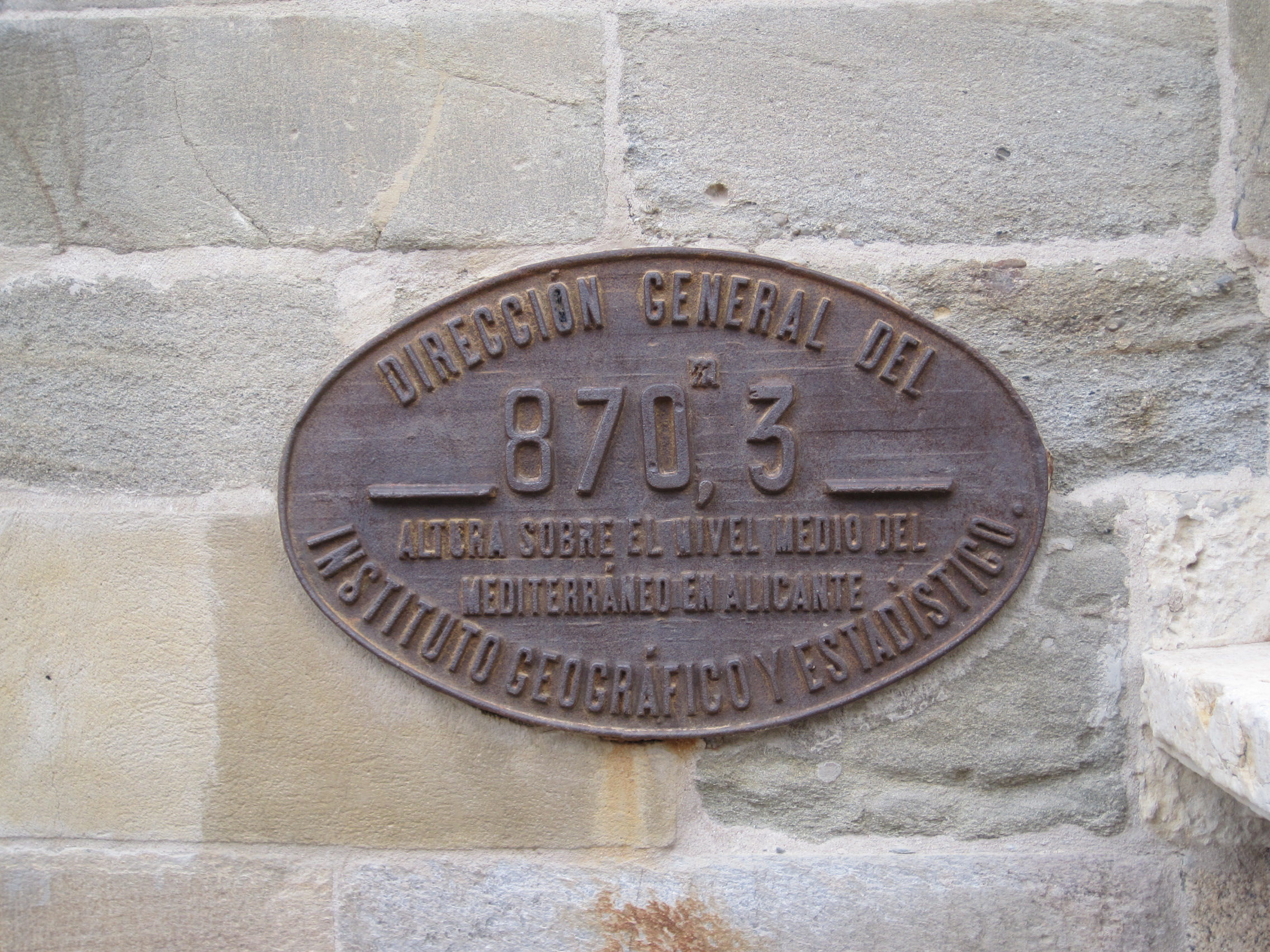 Placa indicadora de la altitud de Astorga (León, España) situada sobre uno de los muros de la catedral.